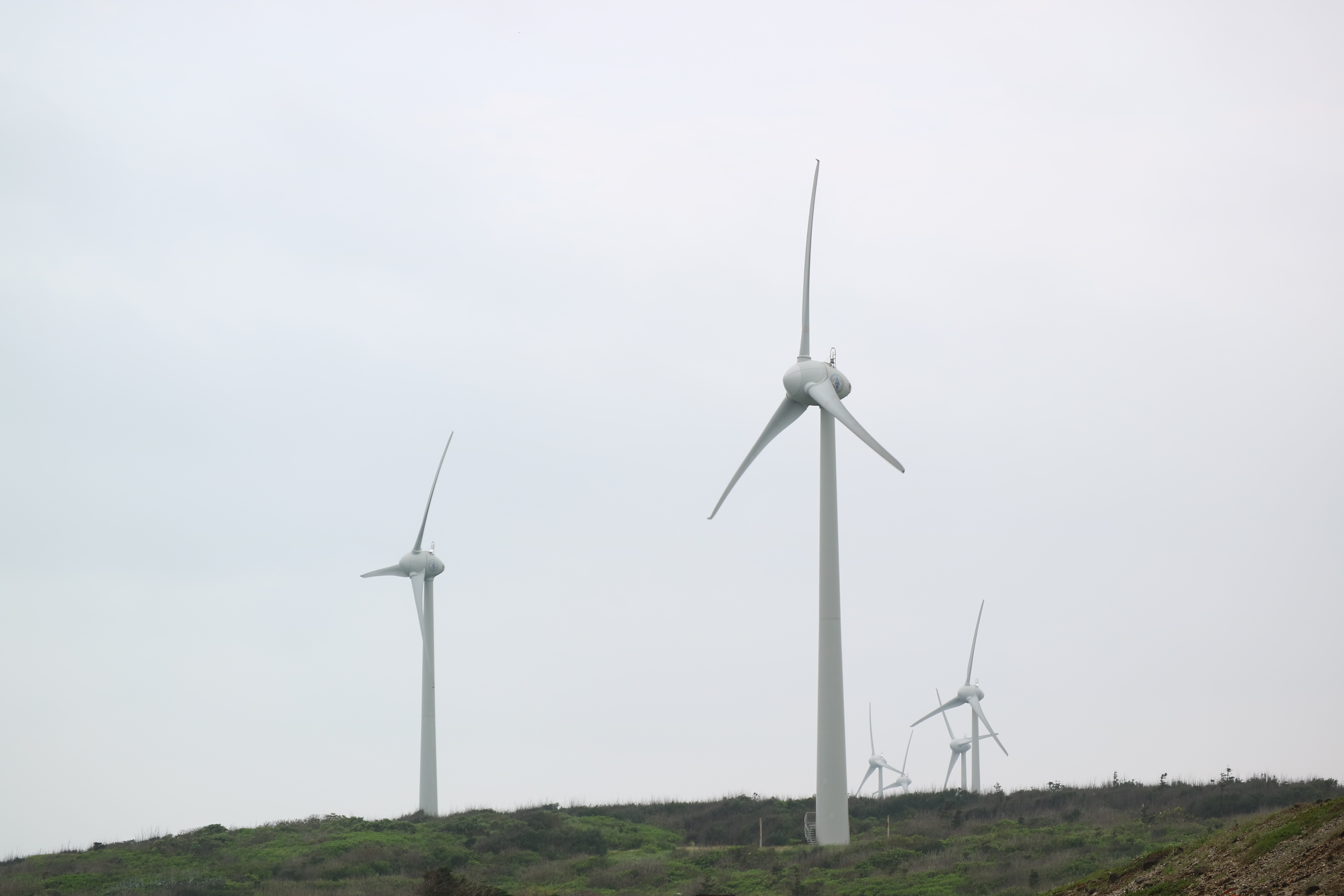 臺灣澎湖縣台電湖西風力發電站。